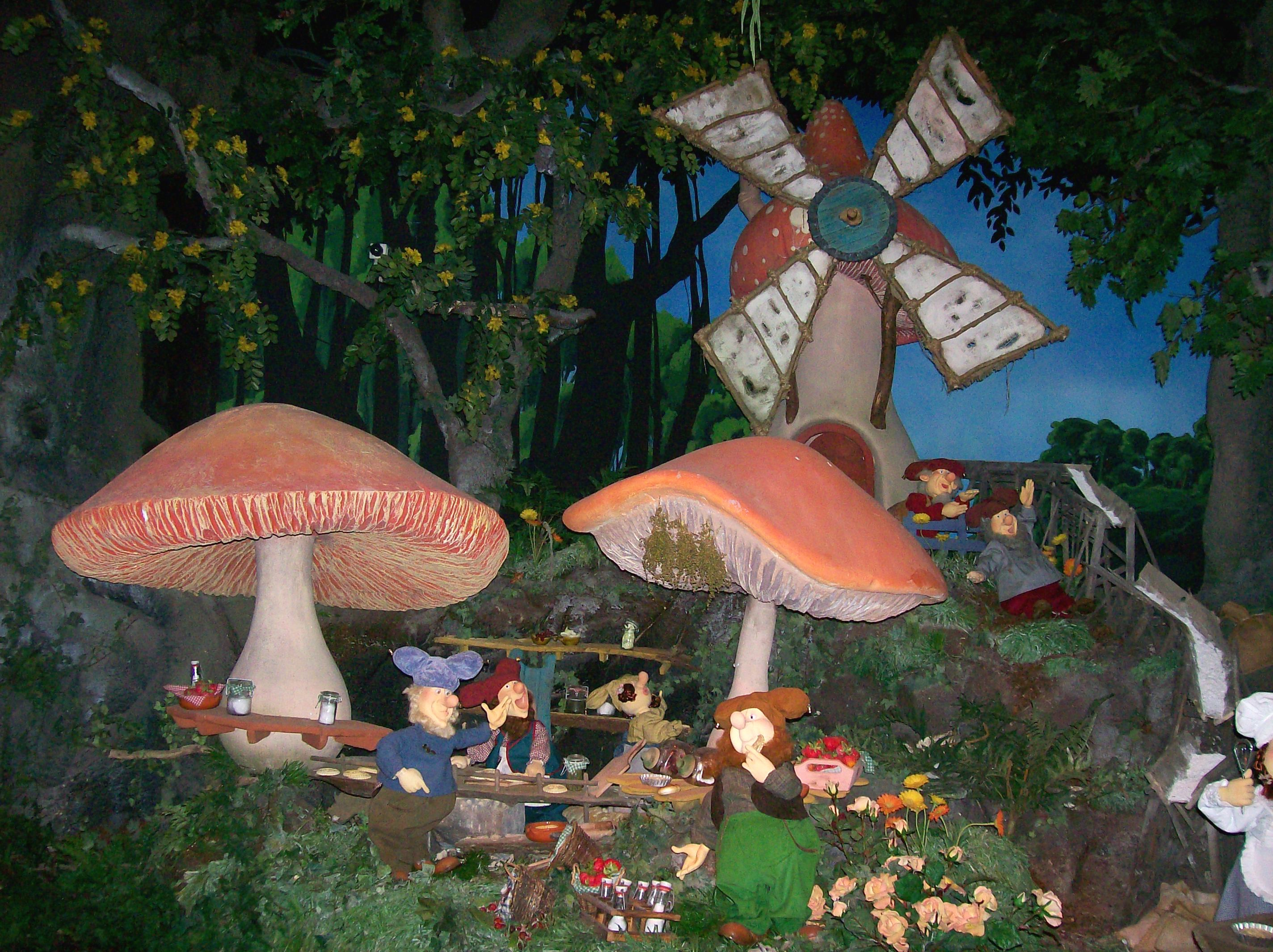 Foret de Plop moulin à vent